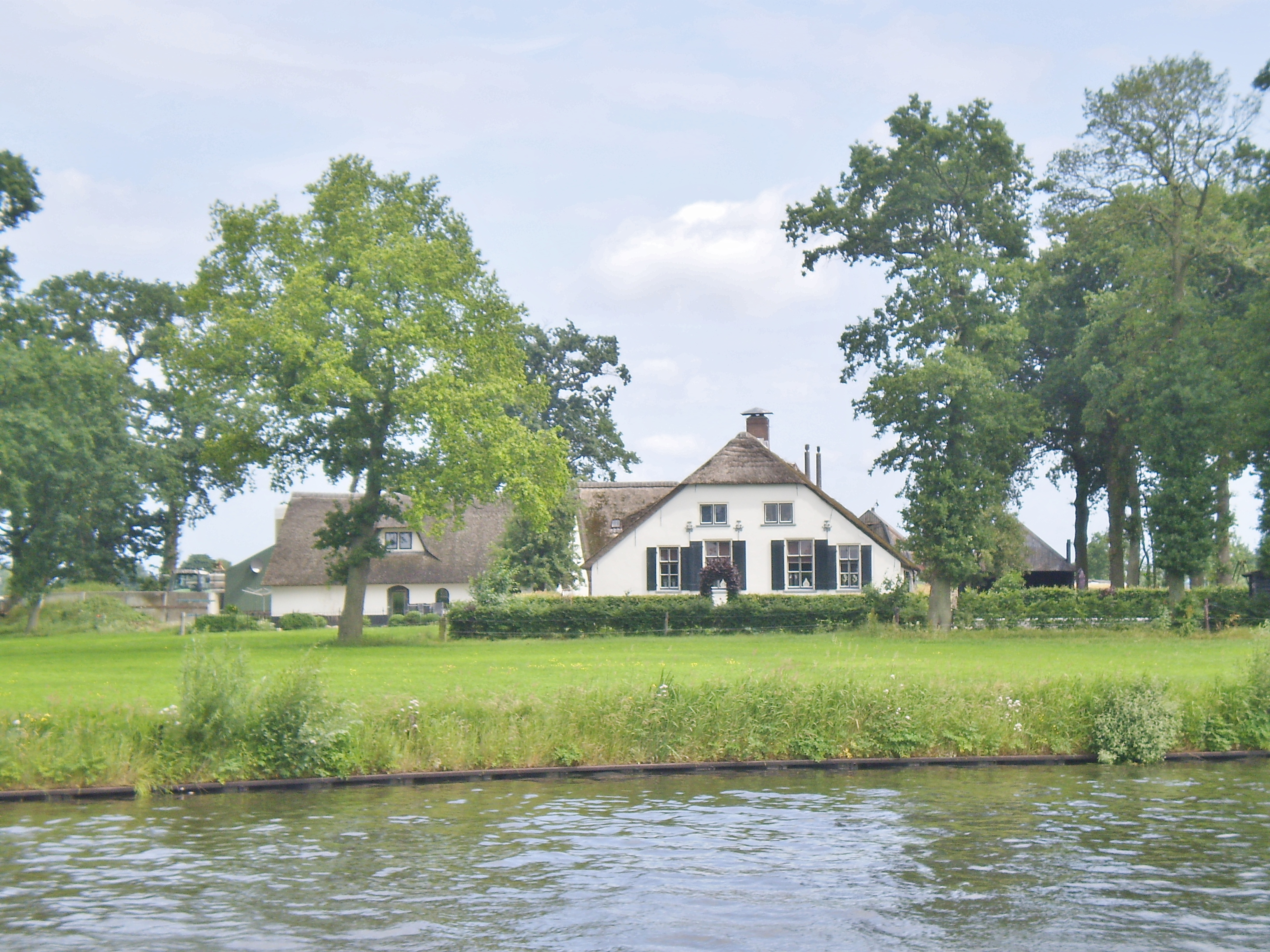 Vanaf de overkant van de Eem